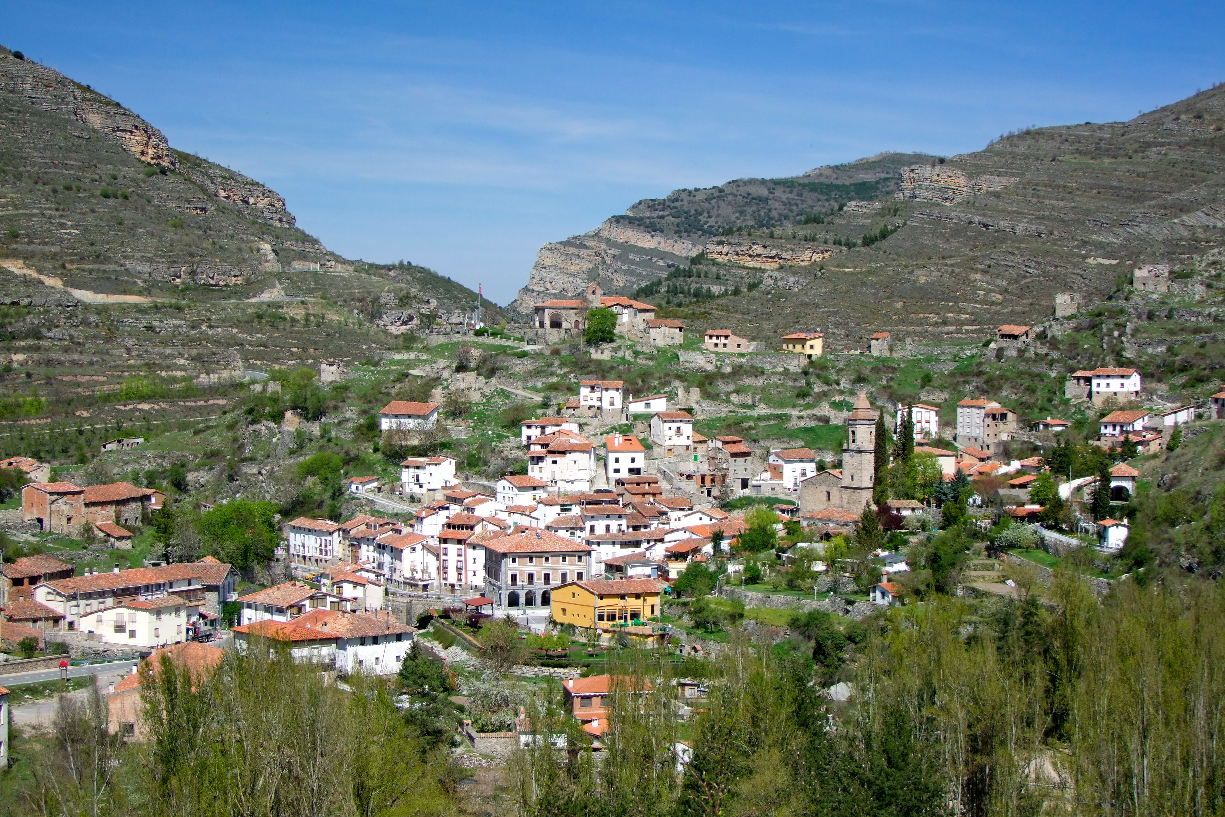 Soto en Cameros, La Rioja - España